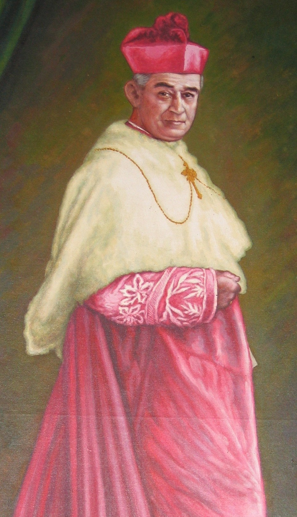 Monseñor Builes, obispo de Santa Rosa de Osos, Antioquia. Colombia.